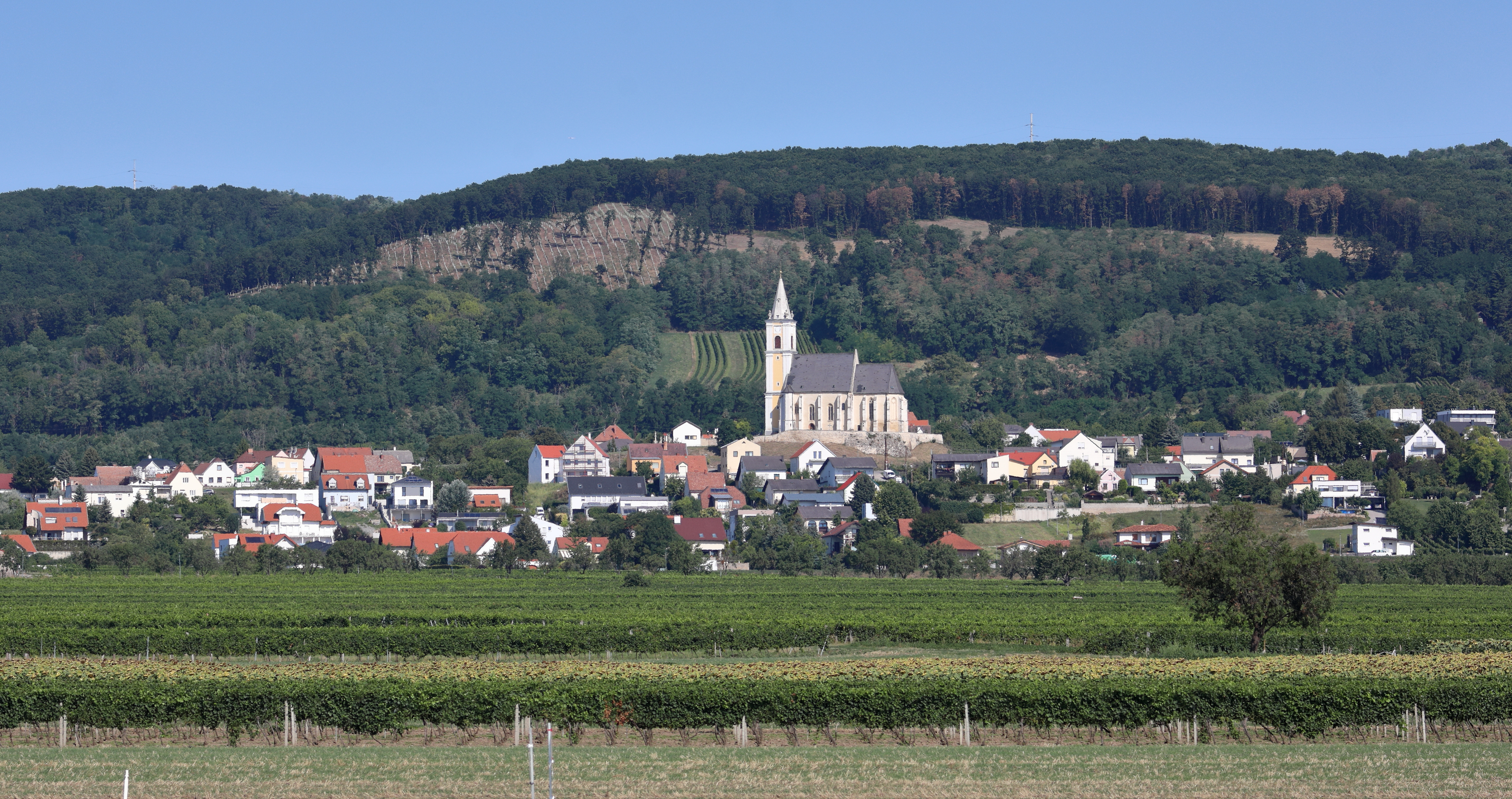 Südostansicht von Kleinhöflein, ein Ortsteil der burgenländischen Landeshauptstadt Eisenstadt. In der Bildmitte die in erhöhter Lage errichtete und ortsbildbeherrschende röm.-kath. Pfarrkirche hl. Veit und im Hintergrund das Leithagebirge.